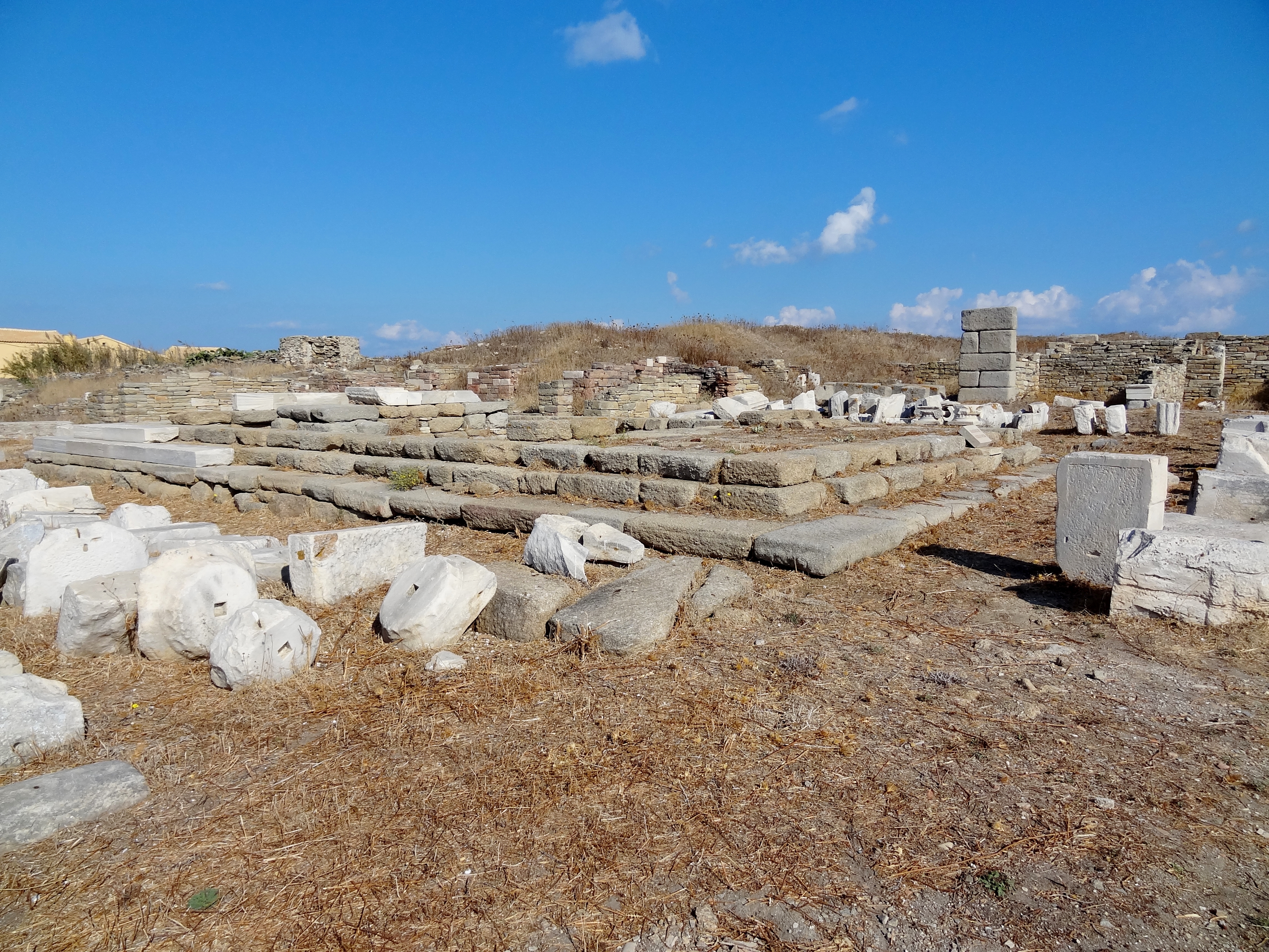 Dodekatheon der Ausgrabungsstätte von Delos, Kykladen, Griechenland